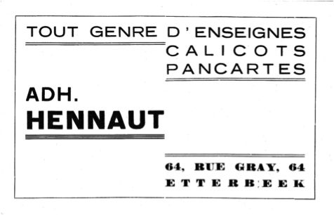 A la fin des années 1930, Adhémar Hennaut s'est déjà installé comme indépendant dans la peinture.